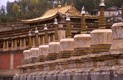 Die acht Eingangschörten (Pagoden) des Kumbum-Klosters